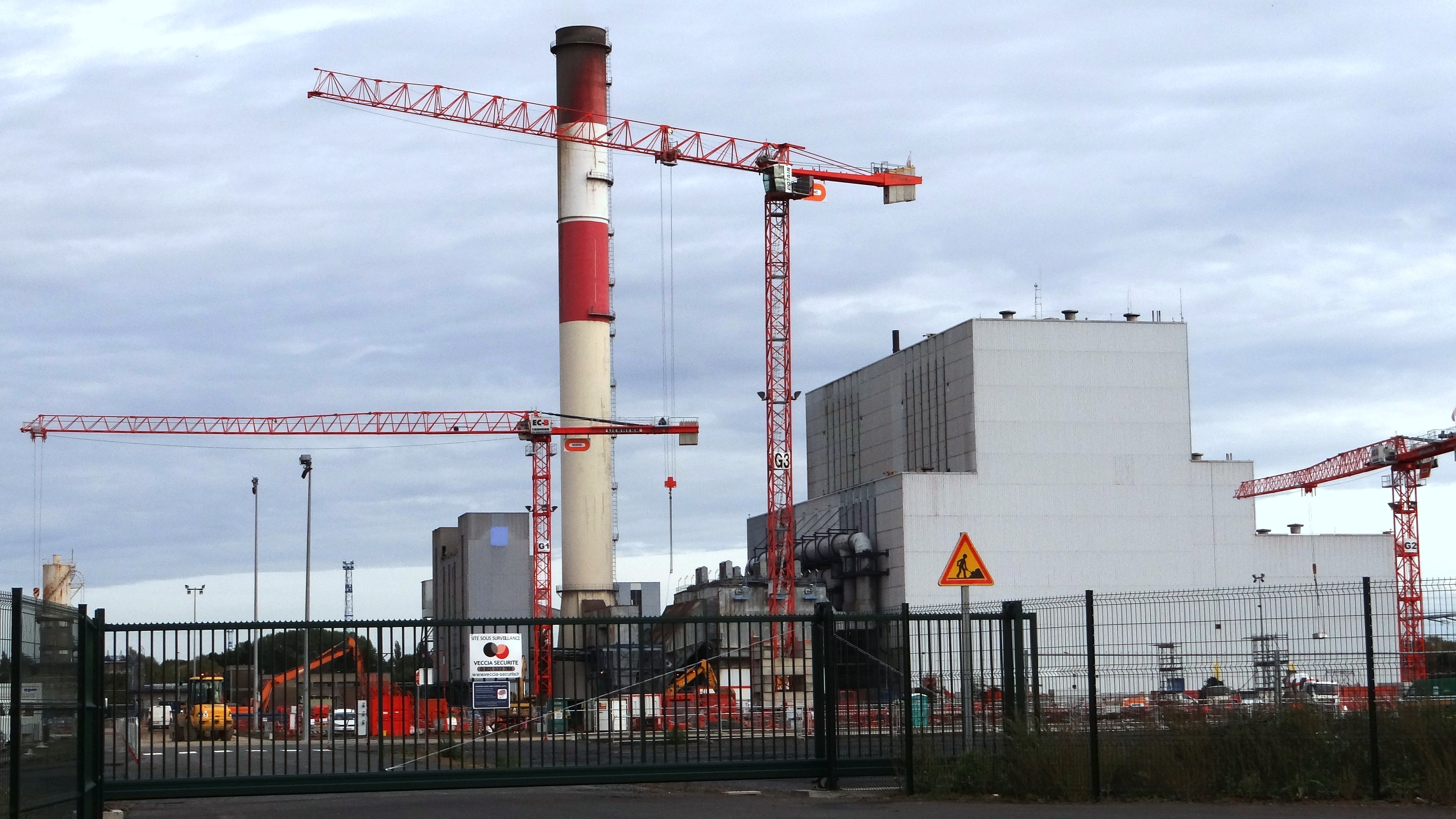 Centrale thermique de Bouchain - chantier CCG